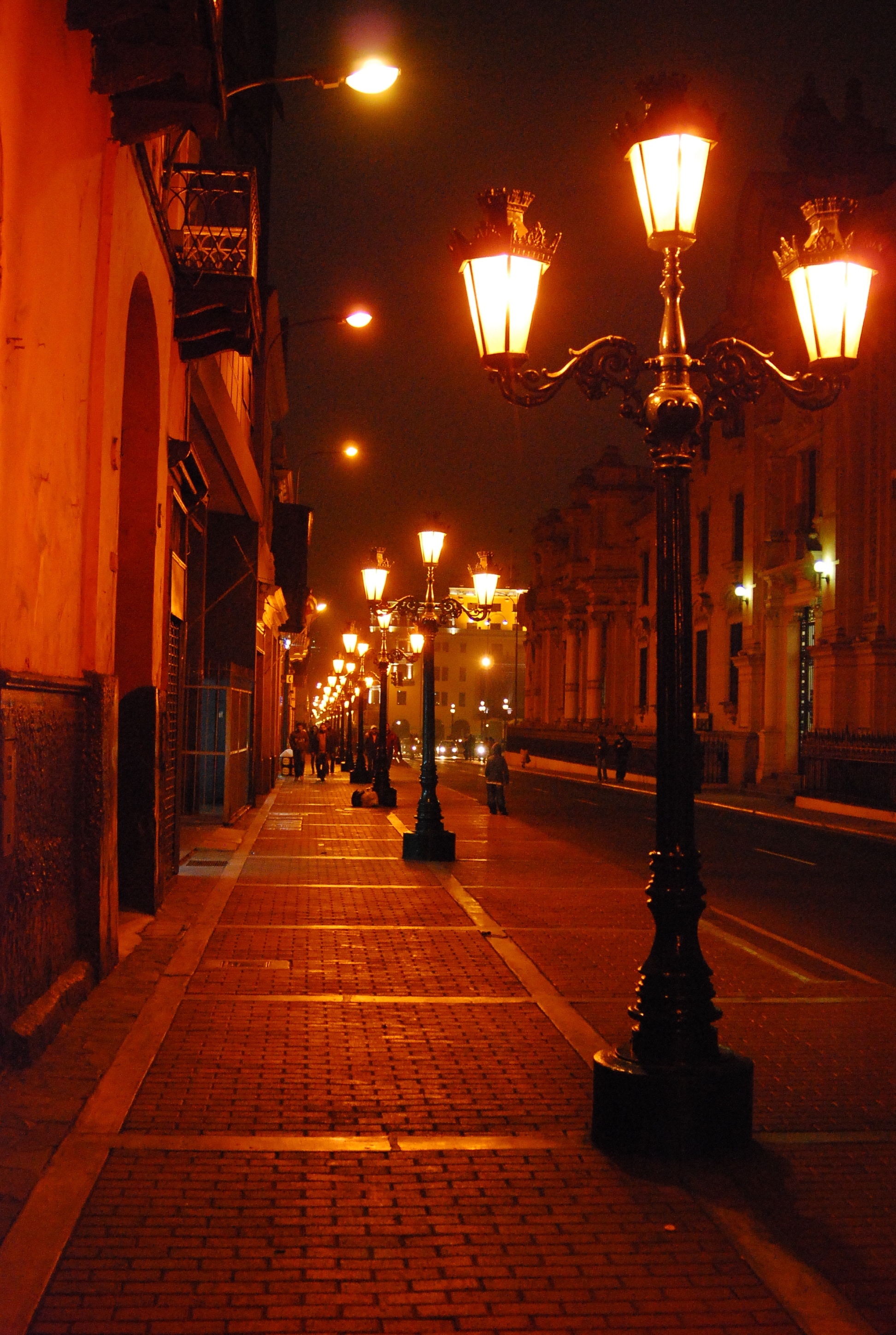 Primera cuadra del Jirón Carabaya (antigua Calle de Pescadería) en Lima, Peru